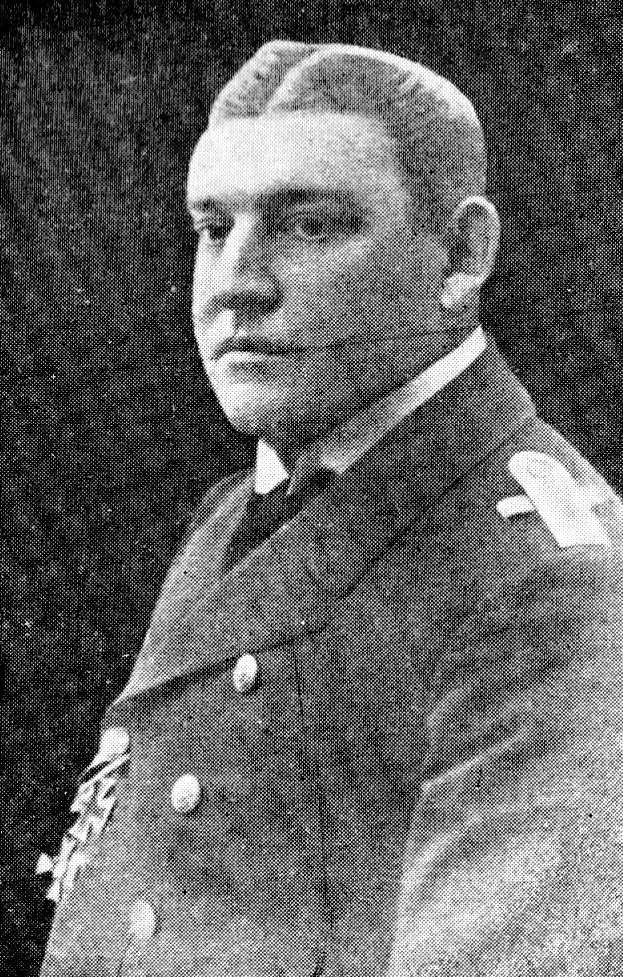 Kapitänleutnant der Reserve Juluis Lauterbach